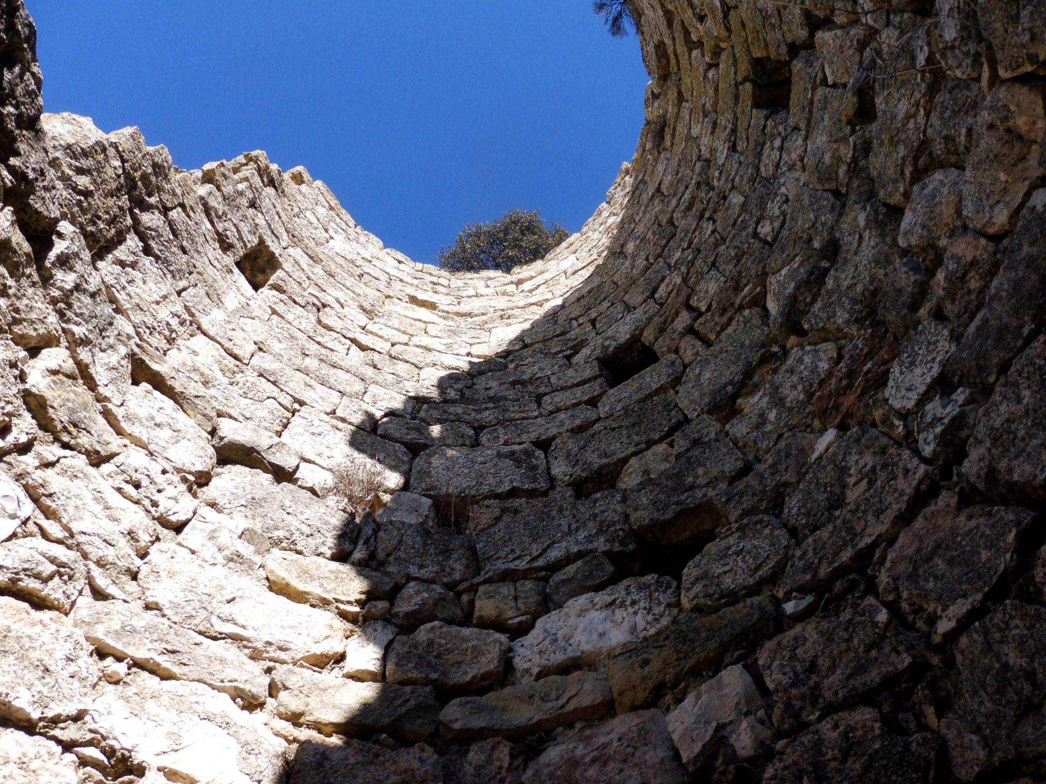 Torre dels Masos de Millà (Àger)